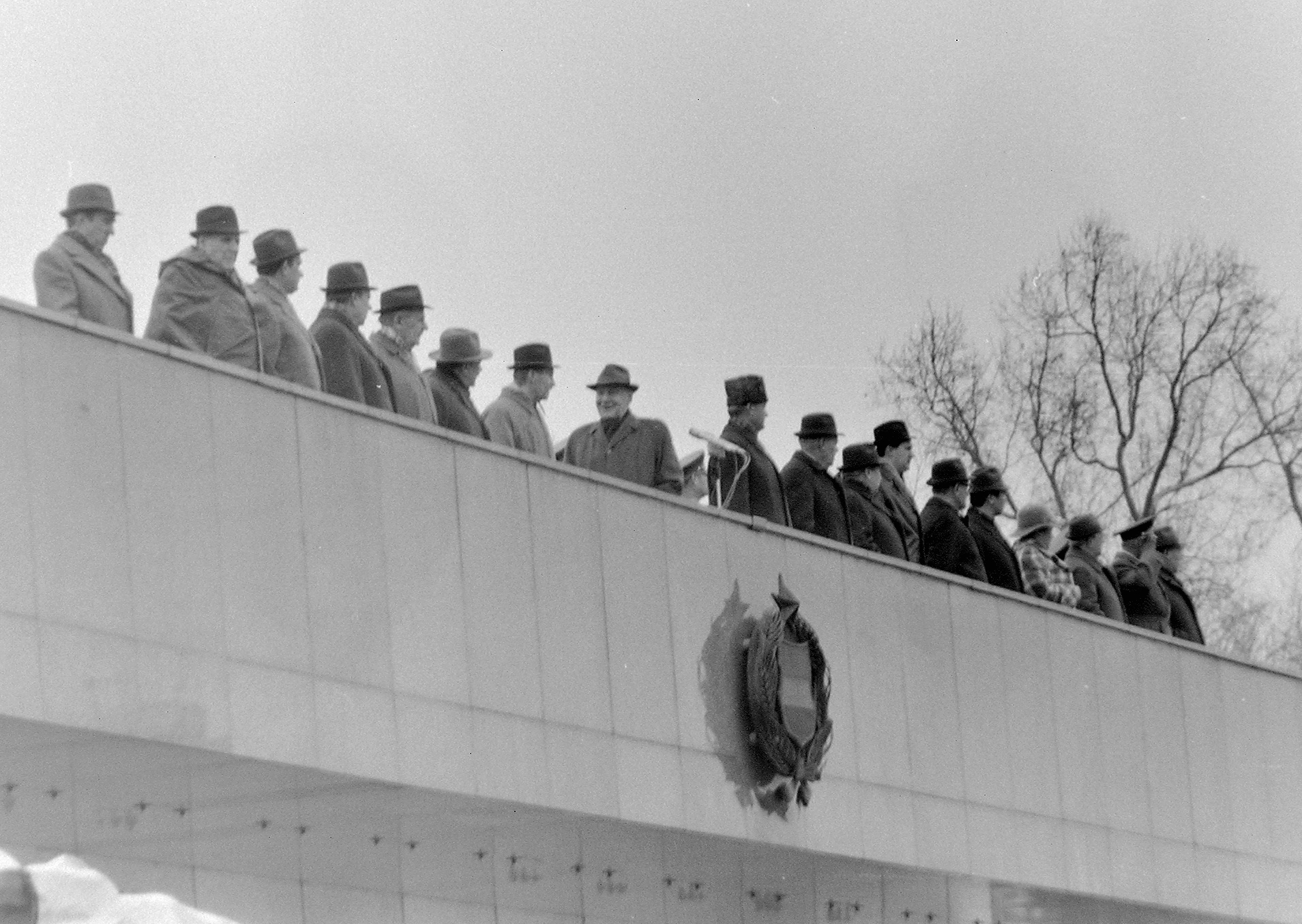 Ötvenhatosok tere (Felvonulási tér), május 1- i felvonulás, dísztribün. középen Kádár János az MSZMP első titkára. Location: Hungary, Budapest XIV. Tags: 1st of May parade, celebrity, crest, Budapest Title: Ötvenhatosok tere (Felvonulási tér), május 1- i felvonulás, dísztribün. középen Kádár János az MSZMP első titkára.